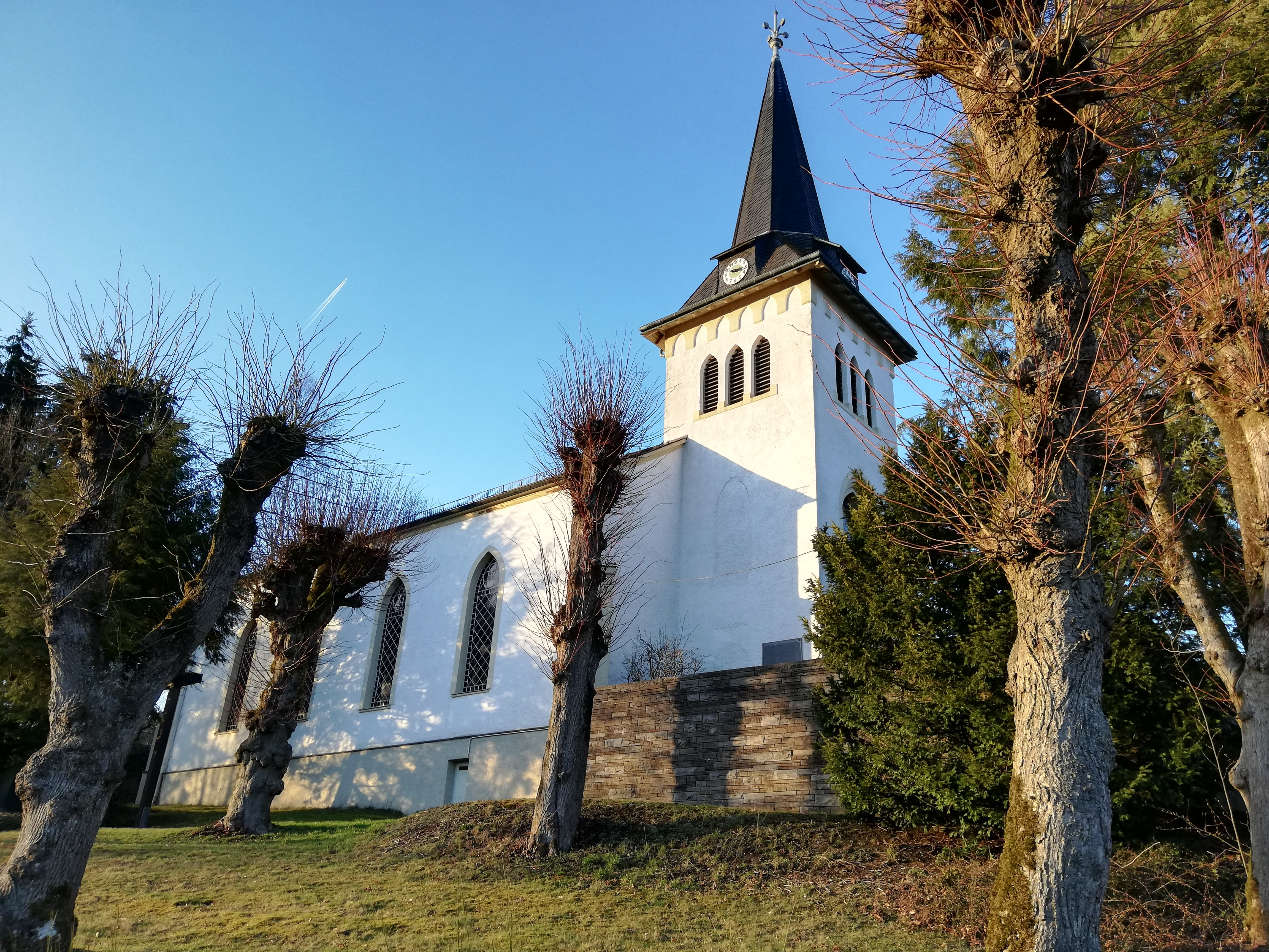 Evankelische KIrche Heidberg. Gottesdienststätte der Ev. Kirchengemeinde im Oberen Wiehltal.